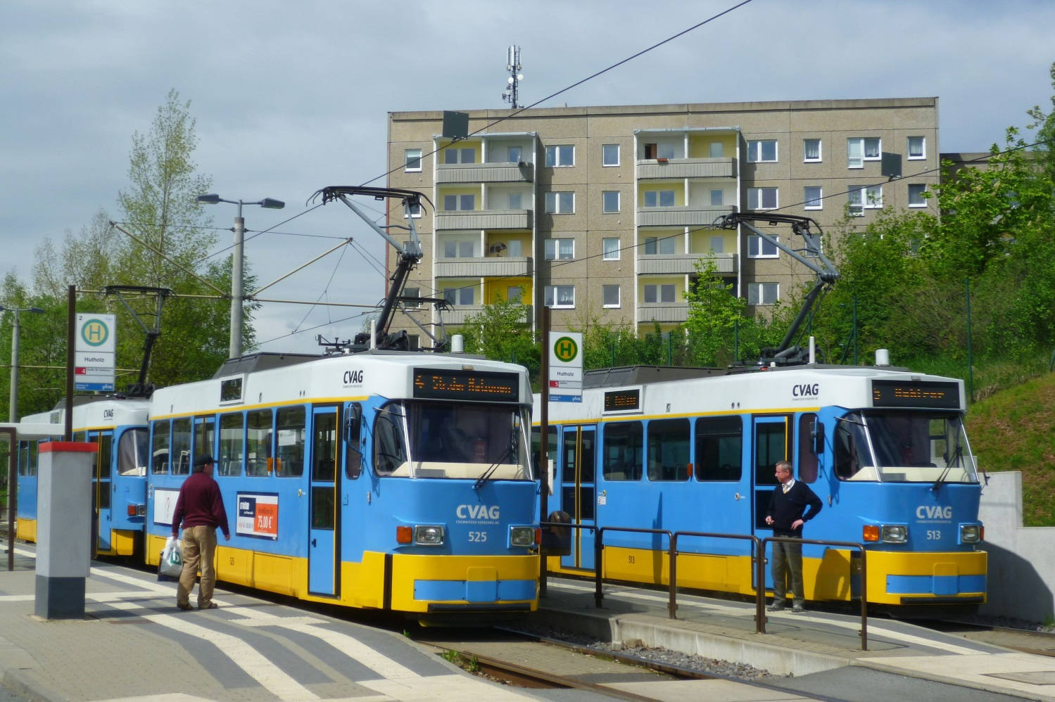 Linie 4 und Linie 5 an der Wendeschleife, Endhaltestelle Hutholz. 13. Mai 2013.